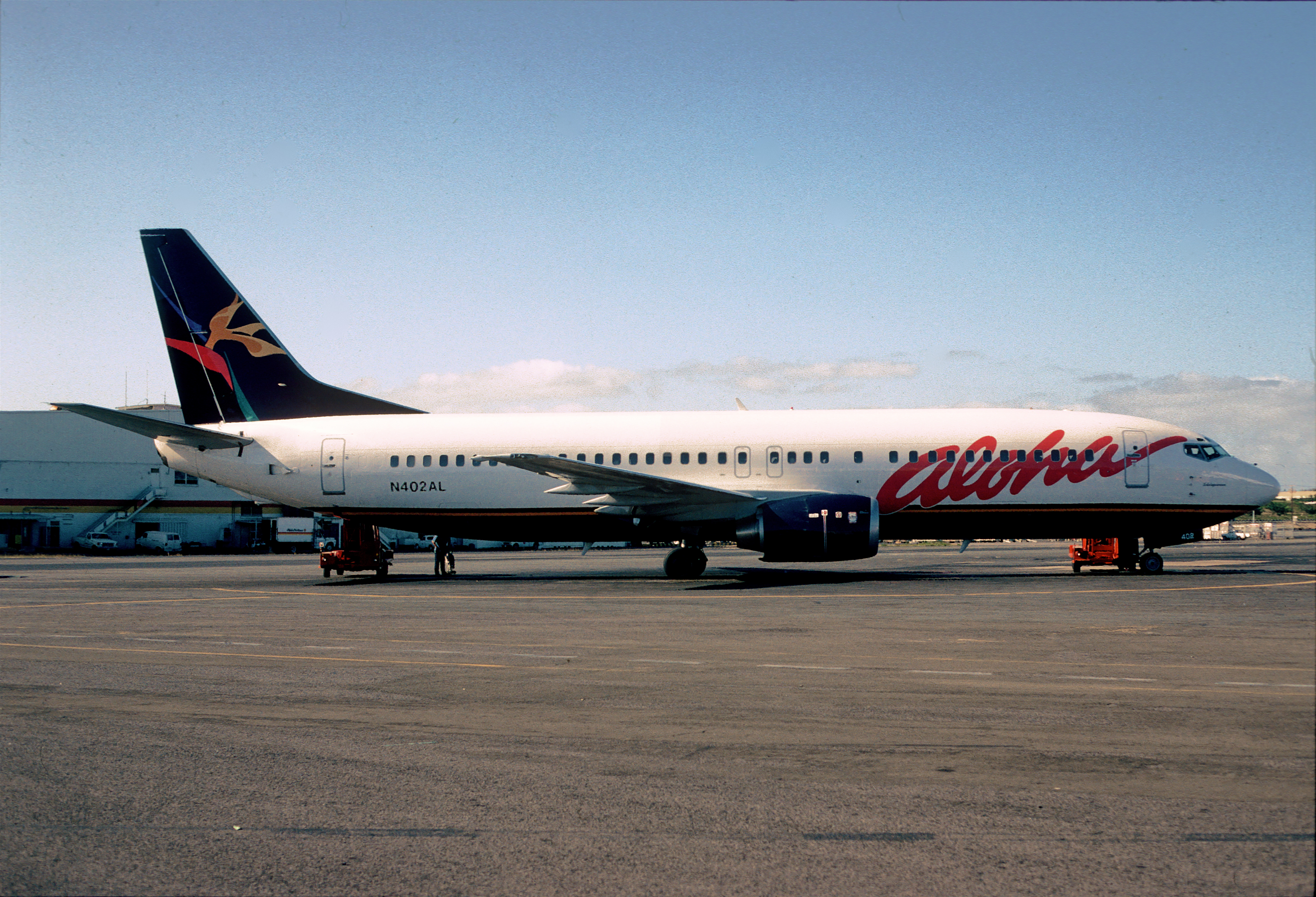 Aloha Airlines Boeing 737-497, May 1995; N402AL; CSA